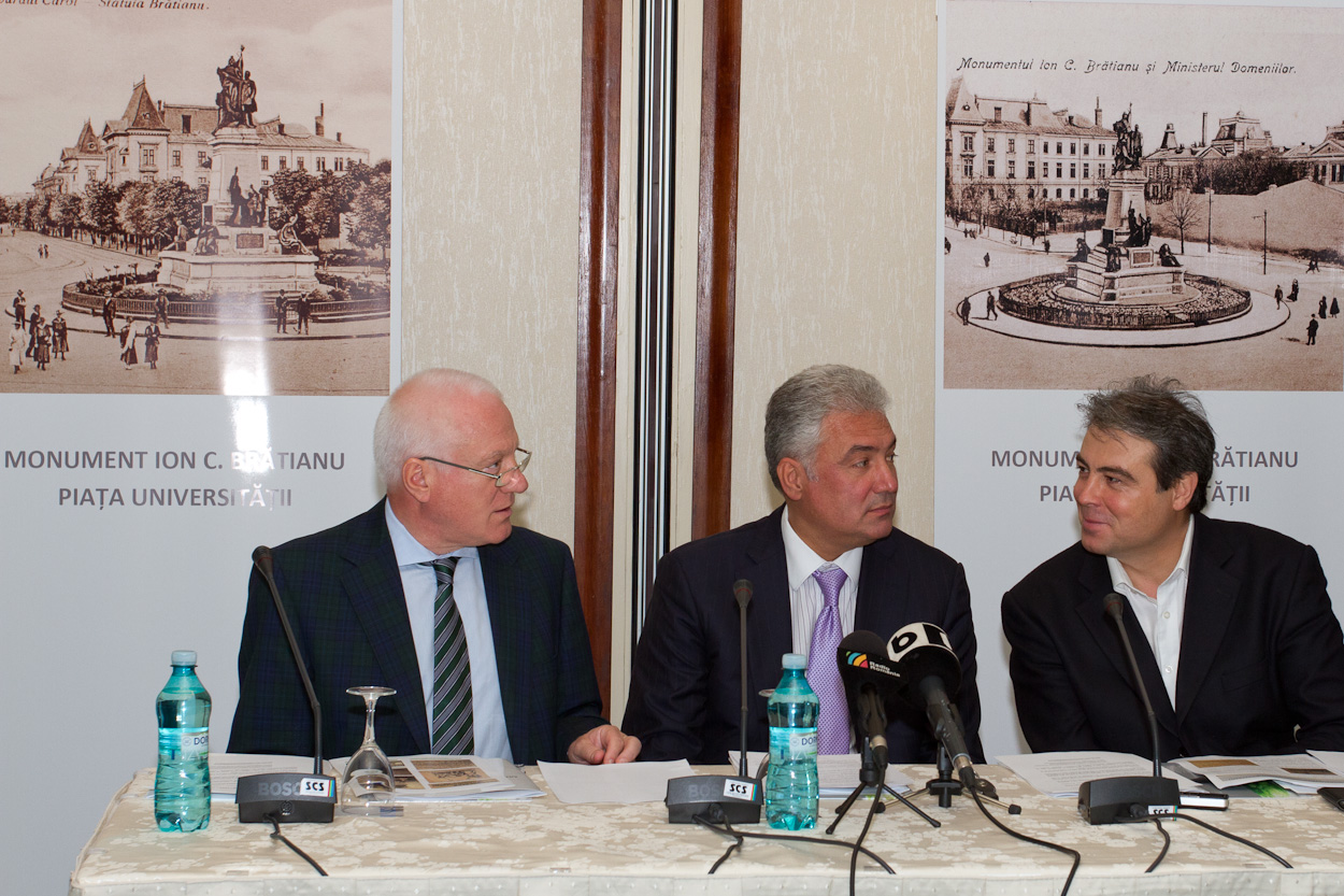 Lansare Asociatia Ion C. Bratianu, 31 mai 2012; Adriean Videanu, Valeriu Stoica, Adrian Cioroianu